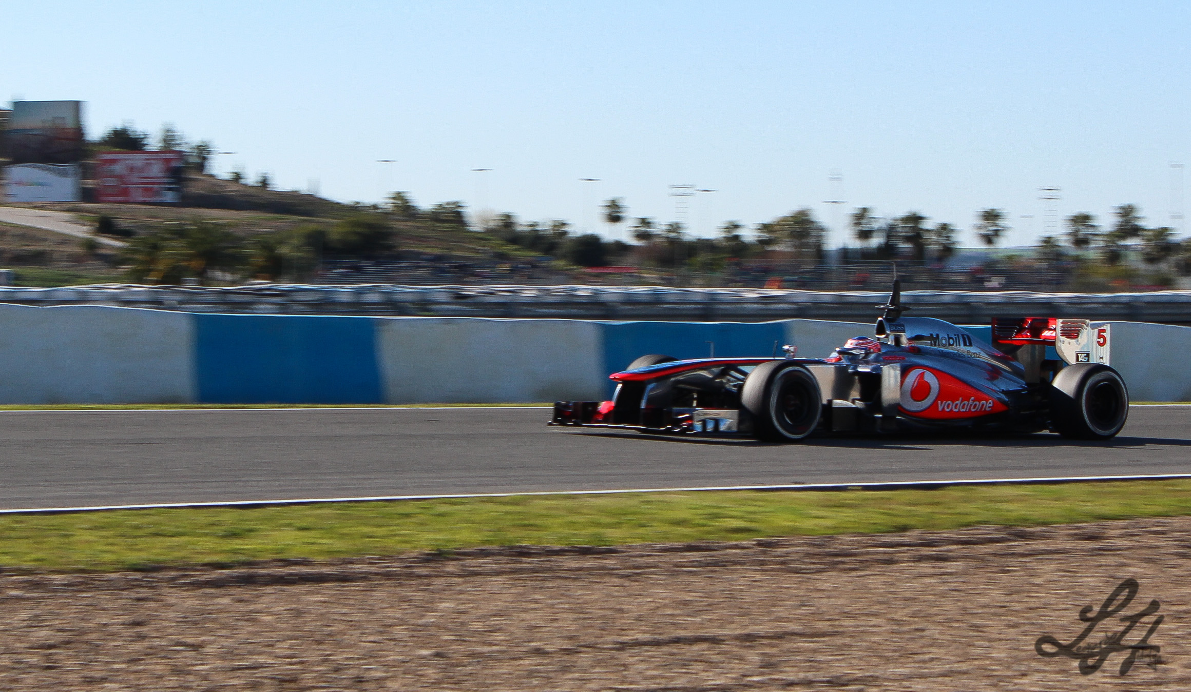 Fotos hechas el 7 de Febrero de 2013 en el circuito de Jerez, plena pre-temporada de F1. Would you like to follow me on Instagram and Twitter?